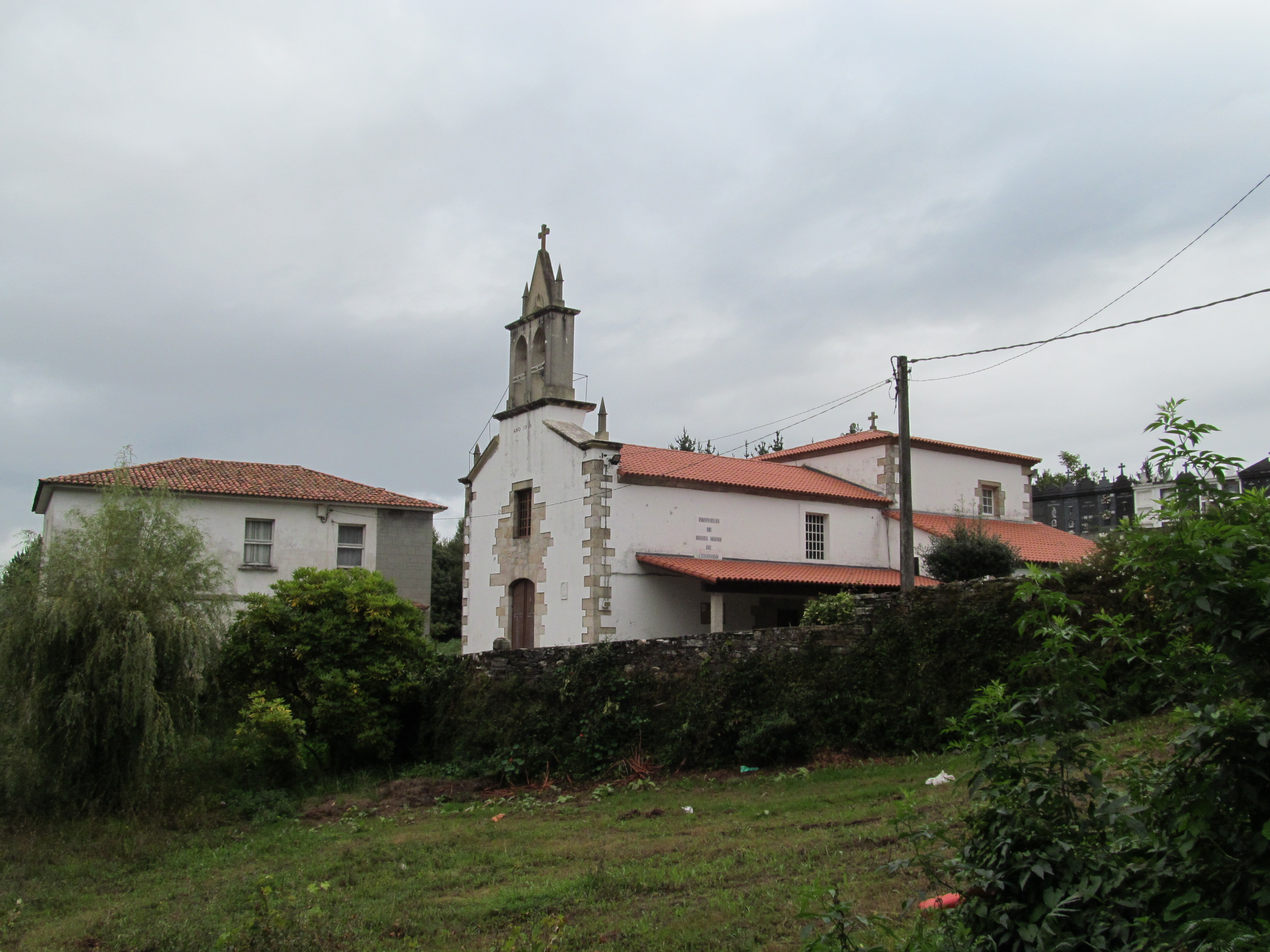 Iglesia parroquial de Santa María de Centroña, en Pontedeume, Galicia, España.